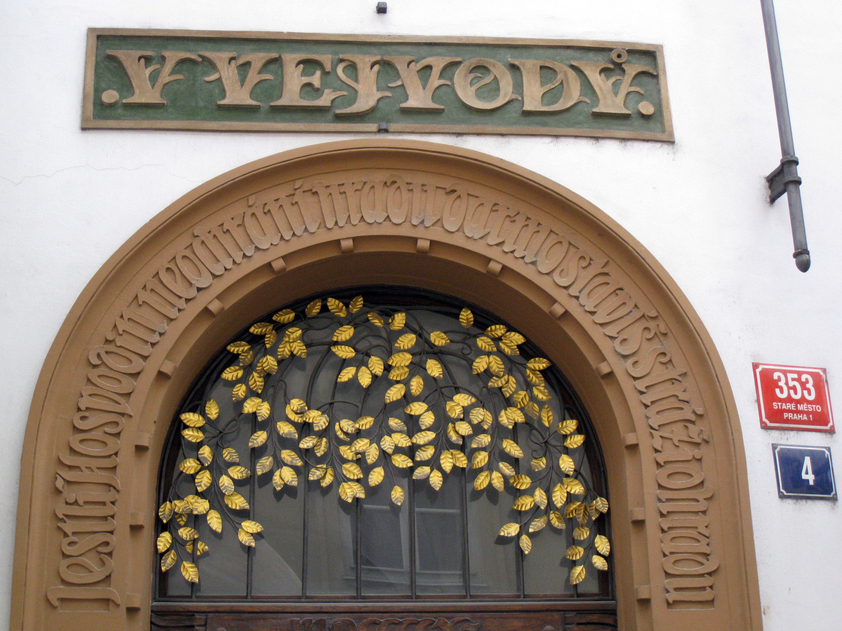 Měšťanský dům U Vejvodů, Praha 1, Jilská, Vejvodova 353/4, Staré Město